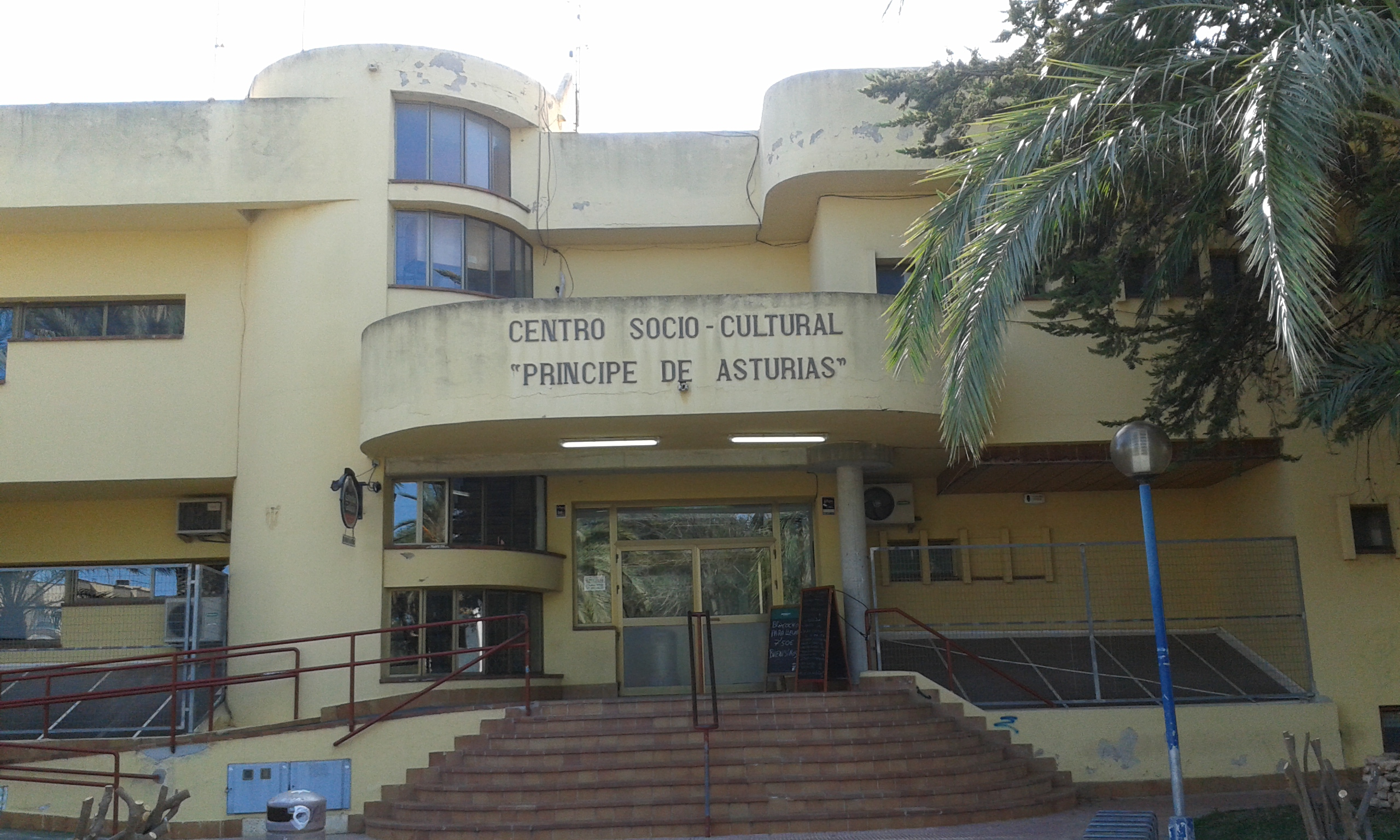 Centro socio-cultural Príncipe de Asturias.